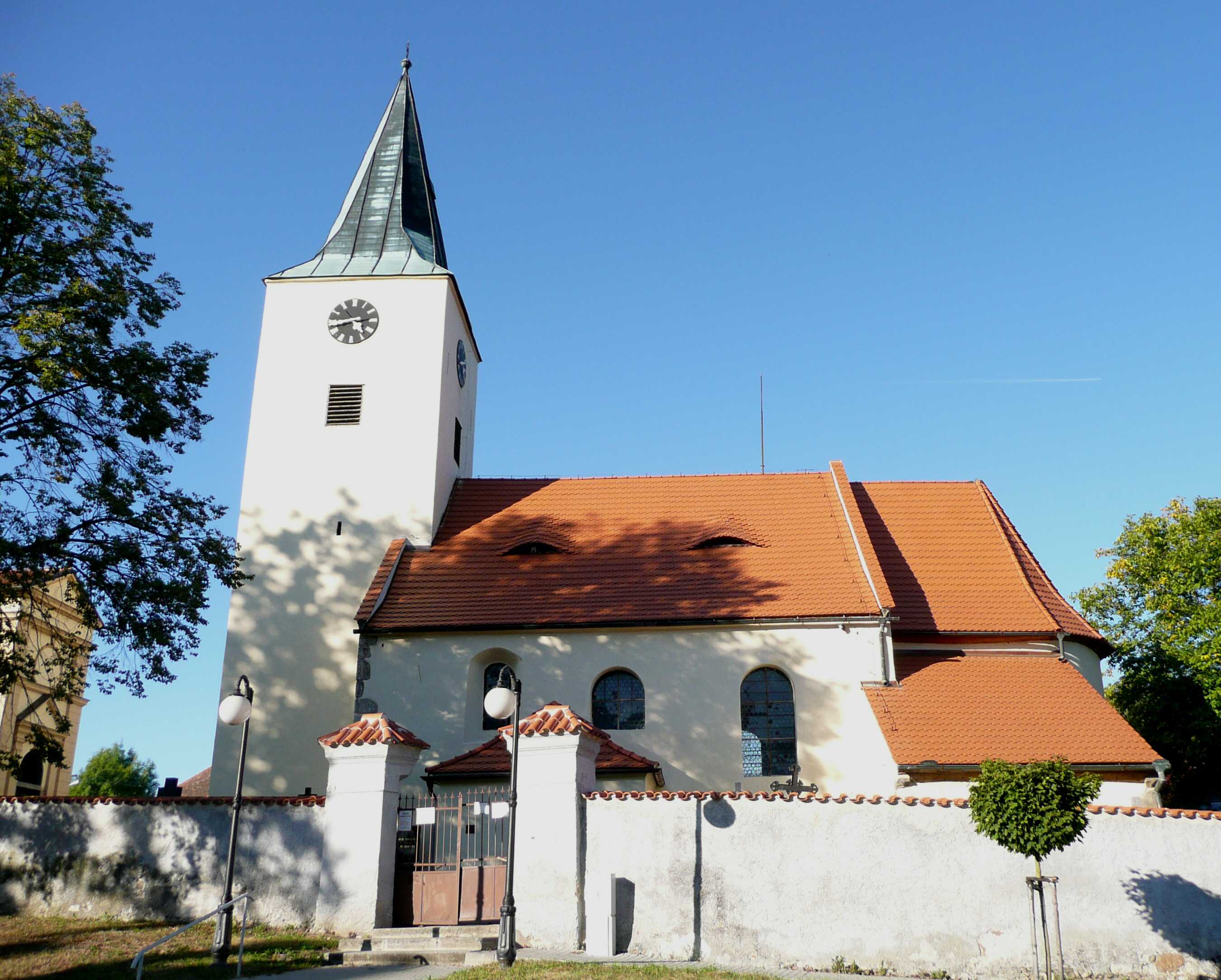 Budětice (okr. Klatovy), kostel sv. Petra a Pavla od jihu.